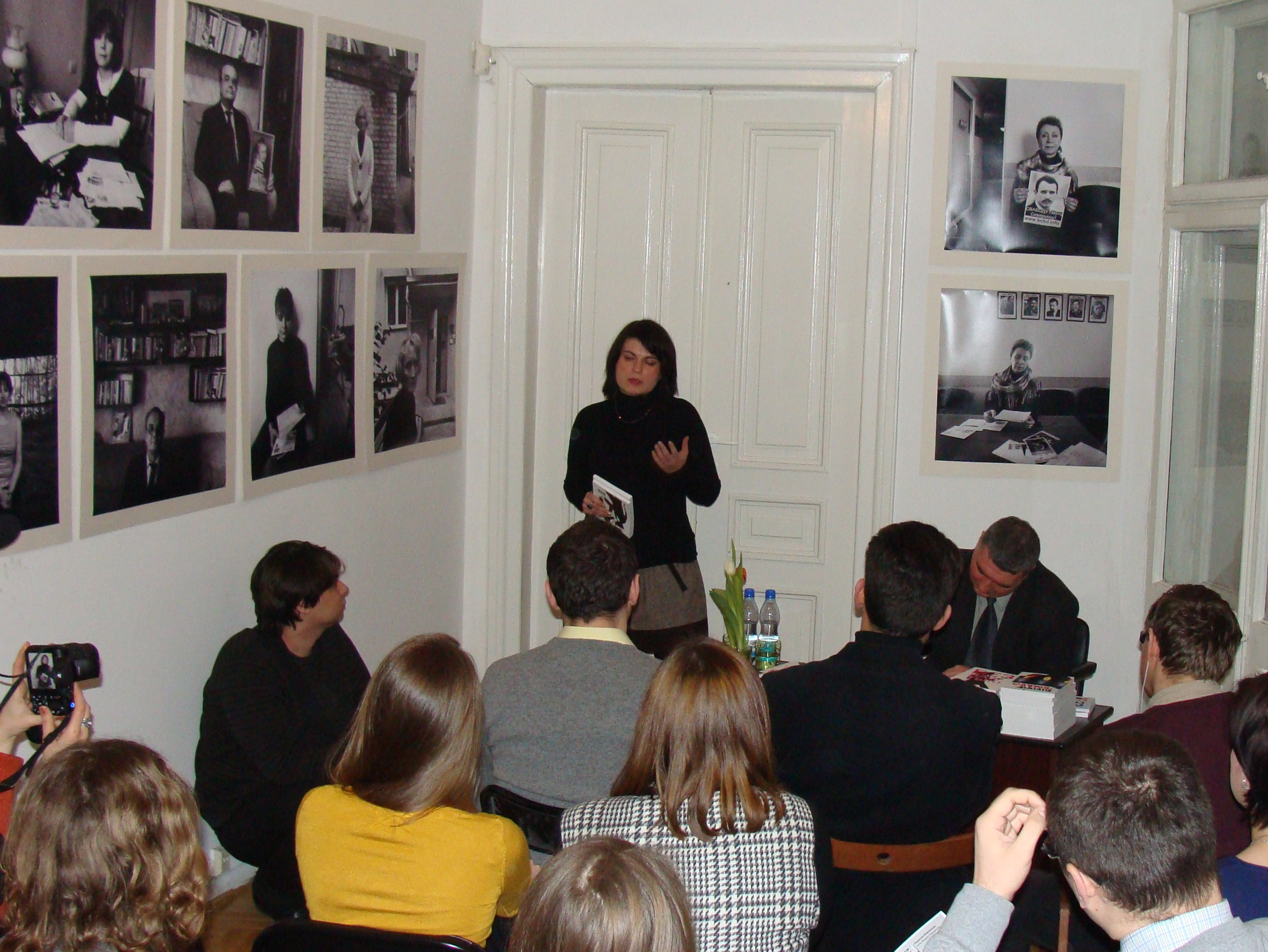 Białoruska dziennikarka Natalla Radzina na spotkaniu w Białoruskim Domu na ul. Wiejskiej 13 w Warszawie.